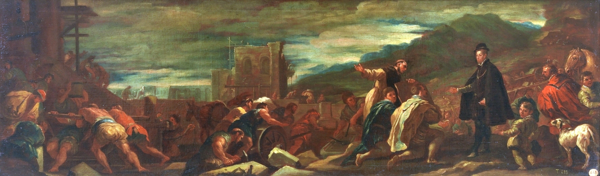 La obra representa al rey Felipe II de España (1527-1598) inspeccionando las obras del monasterio de El Escorial.